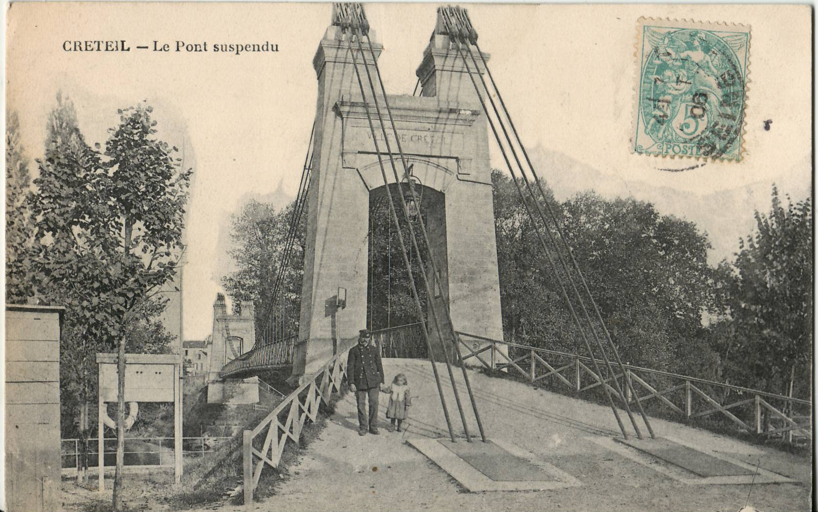 Carte postale ancienne éditée par La Photo :CRÉTEIL - Le Pont suspenduSecond pont de Créteil, construit par l'architecte Joret de 1872 à 1874, détruit et reconstruit en 1962